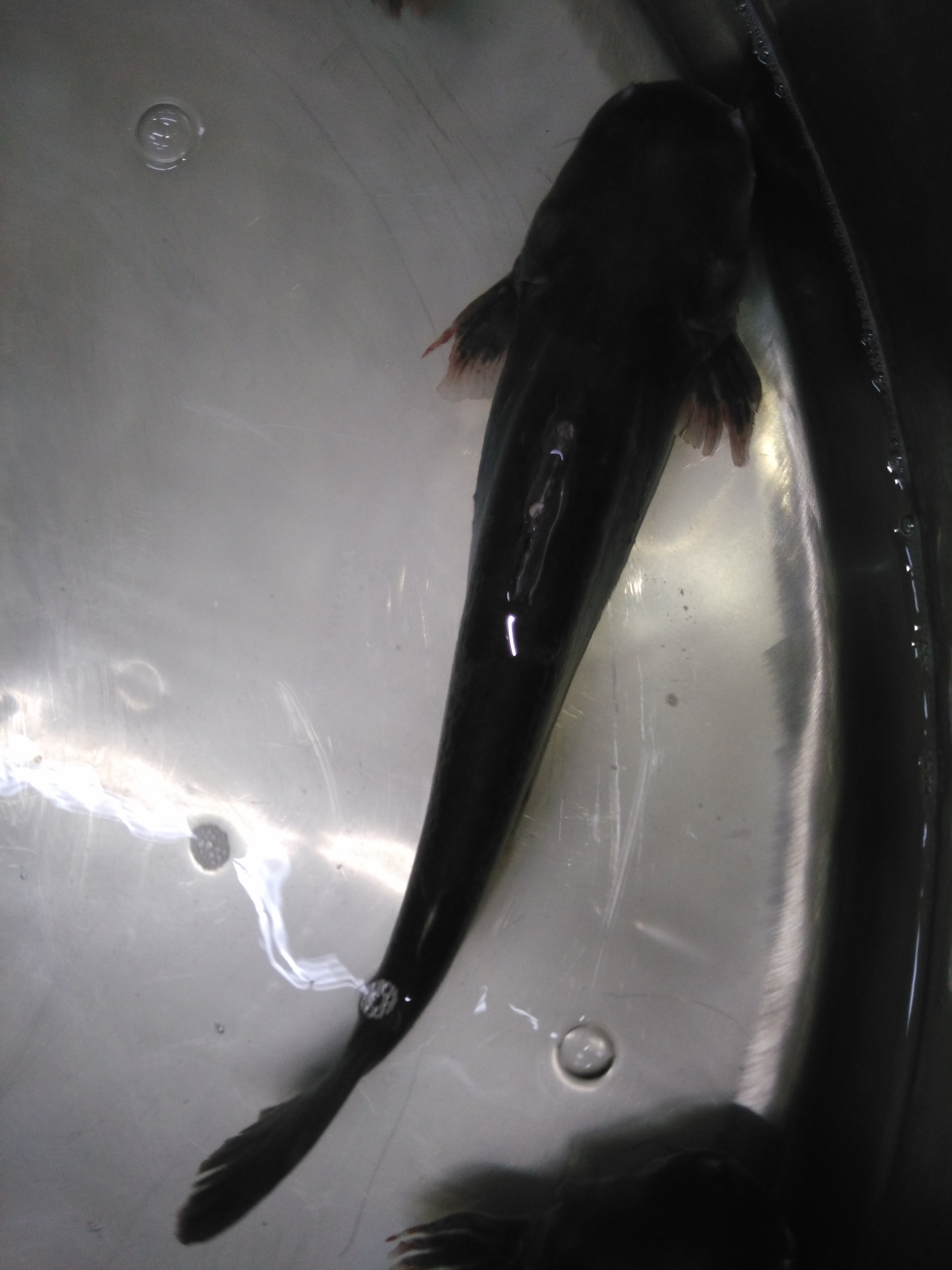 Cá hú tại siêu thị